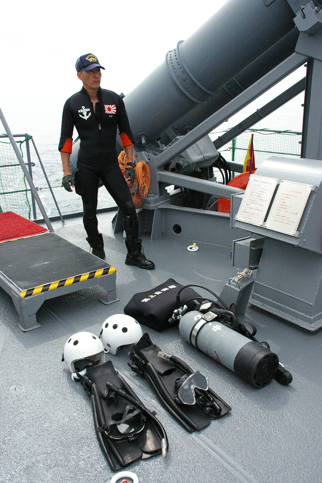 護衛艦ゆうばりの救難員と救難具。